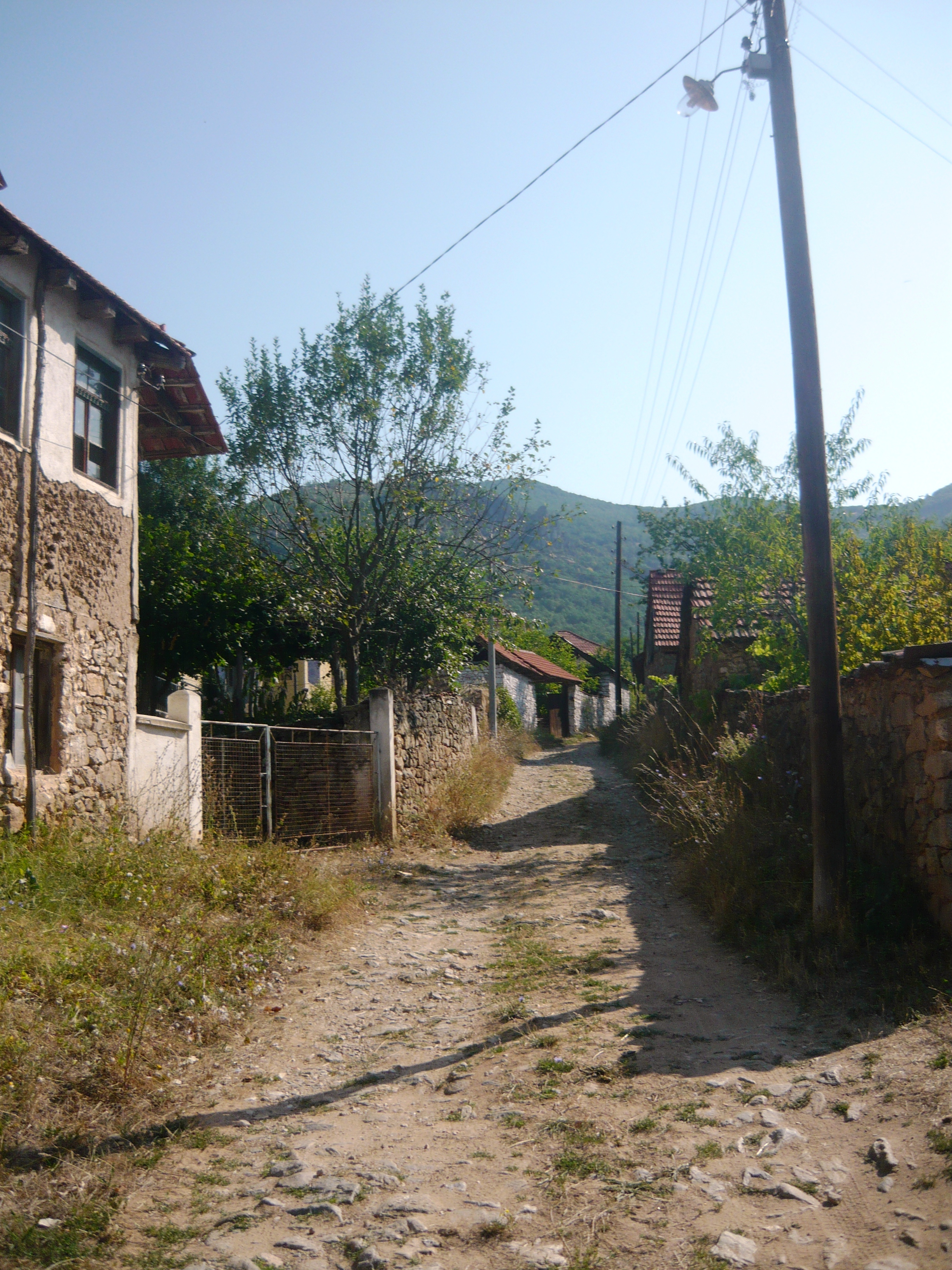 Rastojca